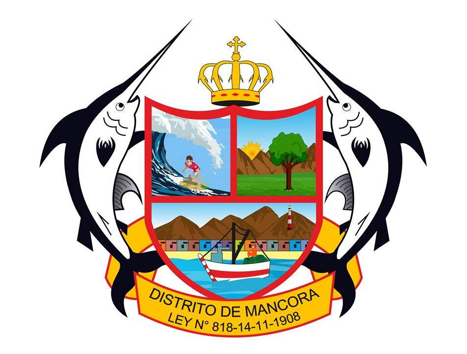 Escudo de Máncora